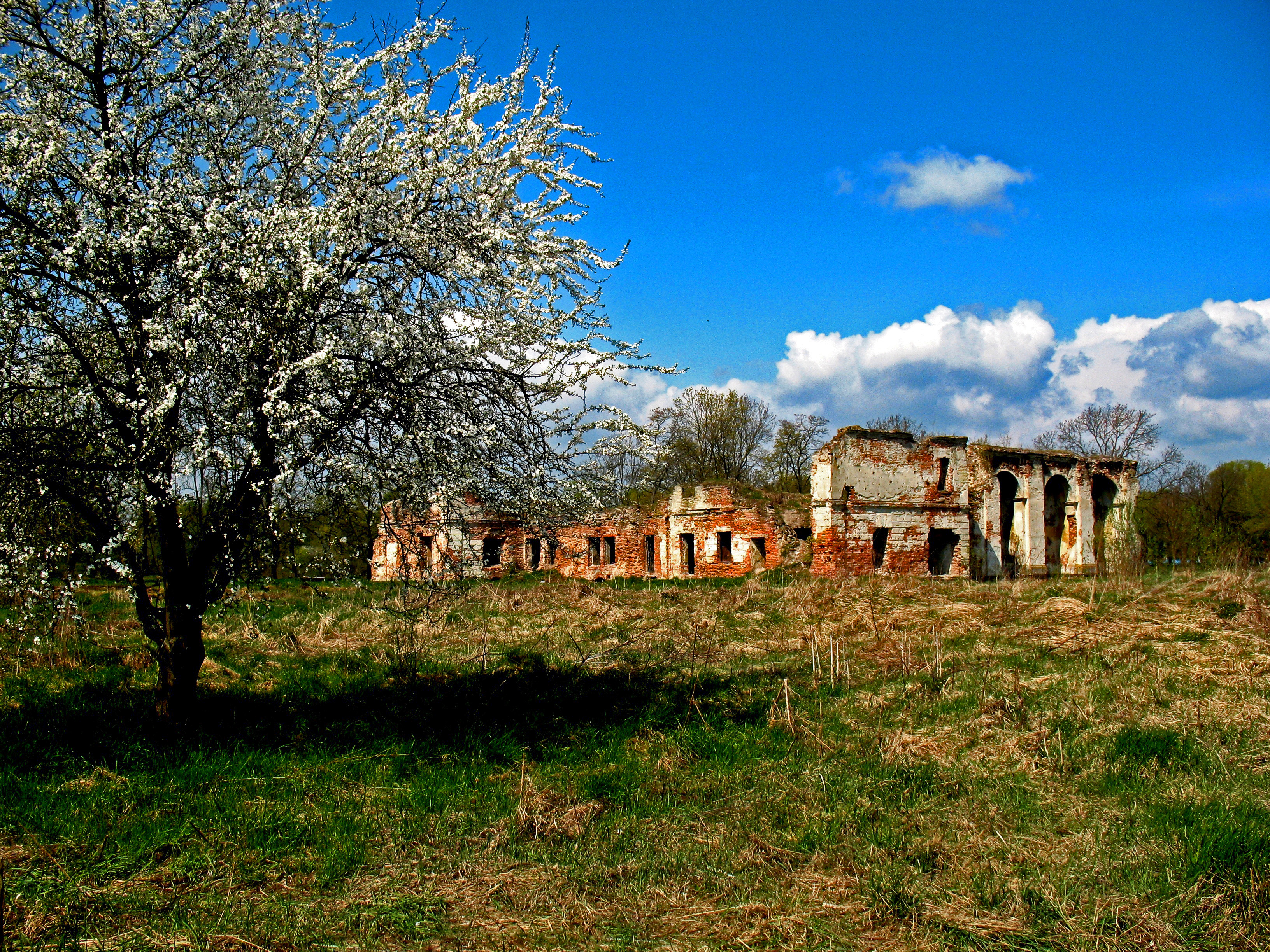 Валынскае ўмацаваньне — 2 бастыённыя франты з 2 равелінамі зьнешняй агароджы, руіны ўпраўленьня Берасьцейскага ваеннага шпіталя №2396 (былы кляштар бэрнардынак), крапасны будынак, казэматаваны рэдзюіт, 12 казэматаў, парахавы склеп, 2 доты 62-га Берасьцейскага ўмацаванага раёну. г. Берасьце This is a photo of Belarusian heritage monument. Reference number: 110Г000725 ( WLM)